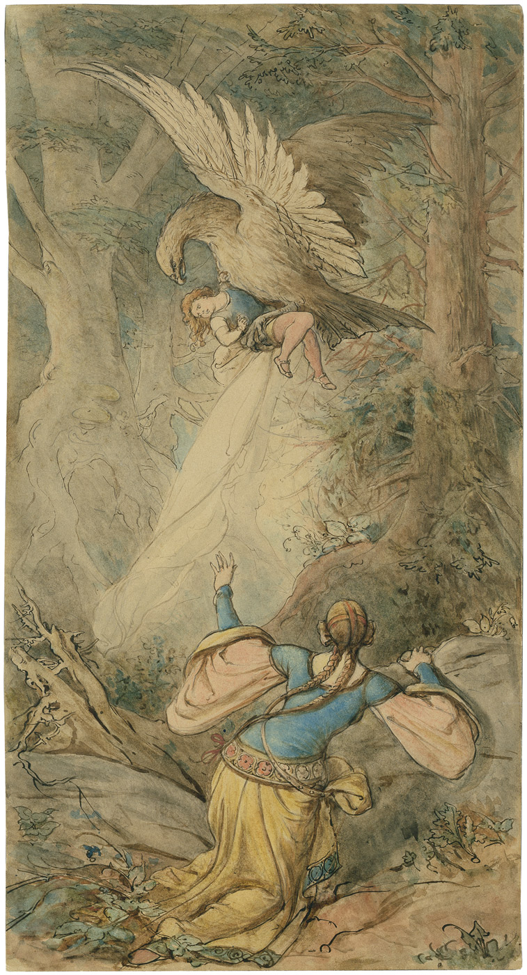 Illustration zu dem Märchen "Fundevogel". Feder in Braun, aquarelliert, über Spuren von schwarzem Stift. 43,8 x 23,1 cm.